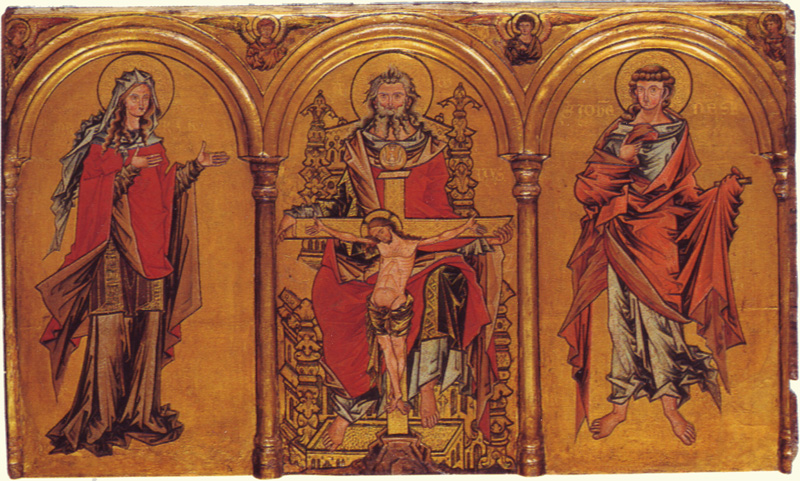 Bedeutung des Opfers Christi